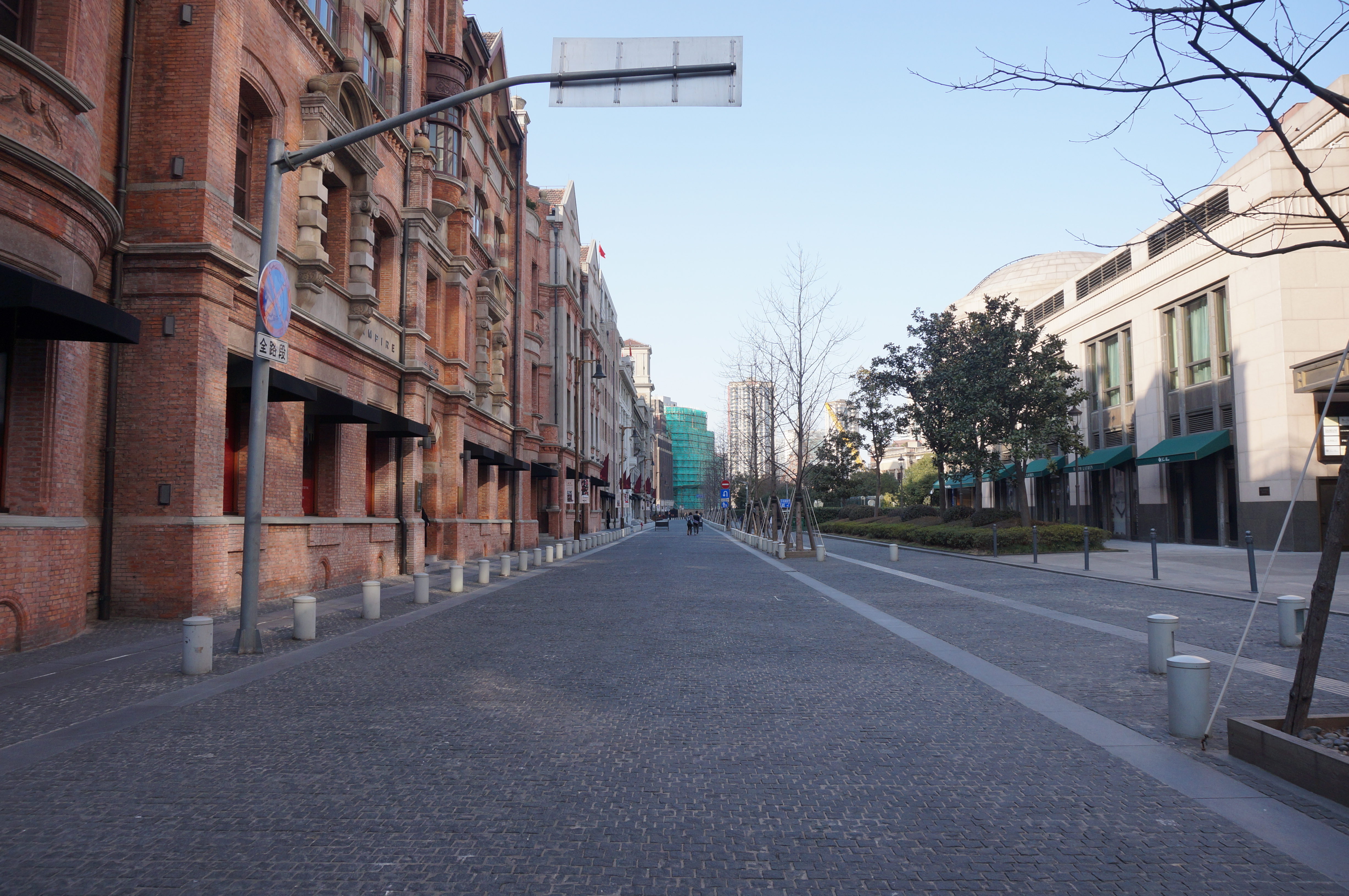 上海圆明园路街景